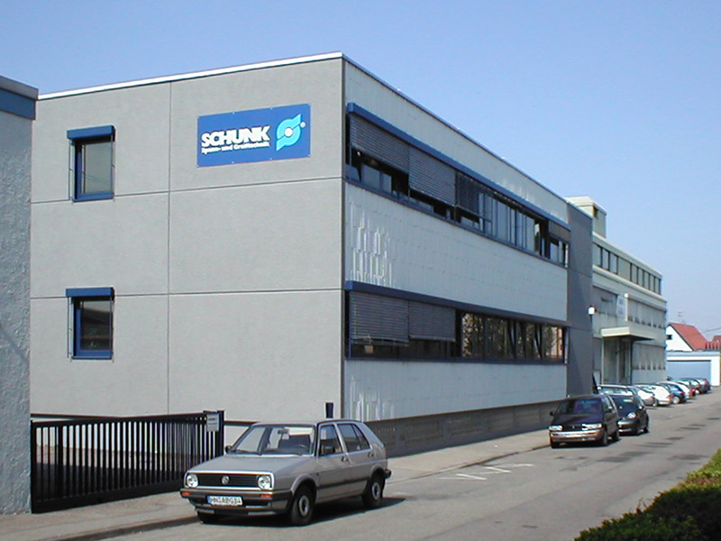 SCHUNK GmbH & Co. KG in Lauffen (Neckar), germany